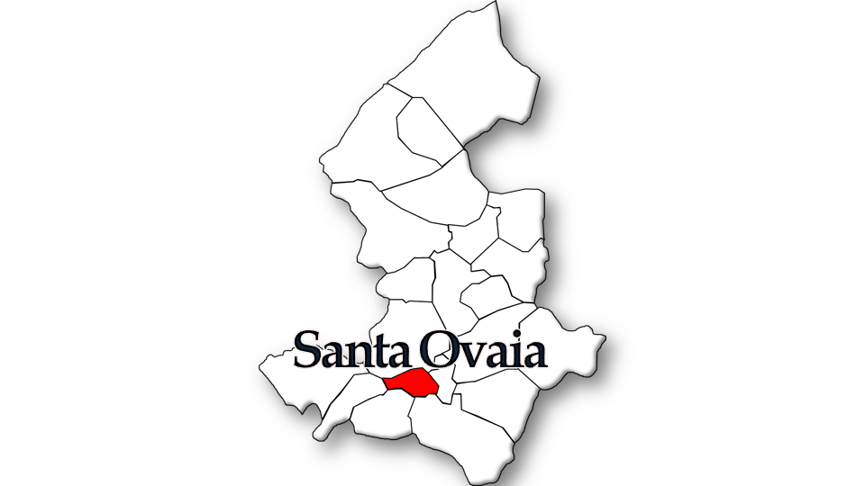 População